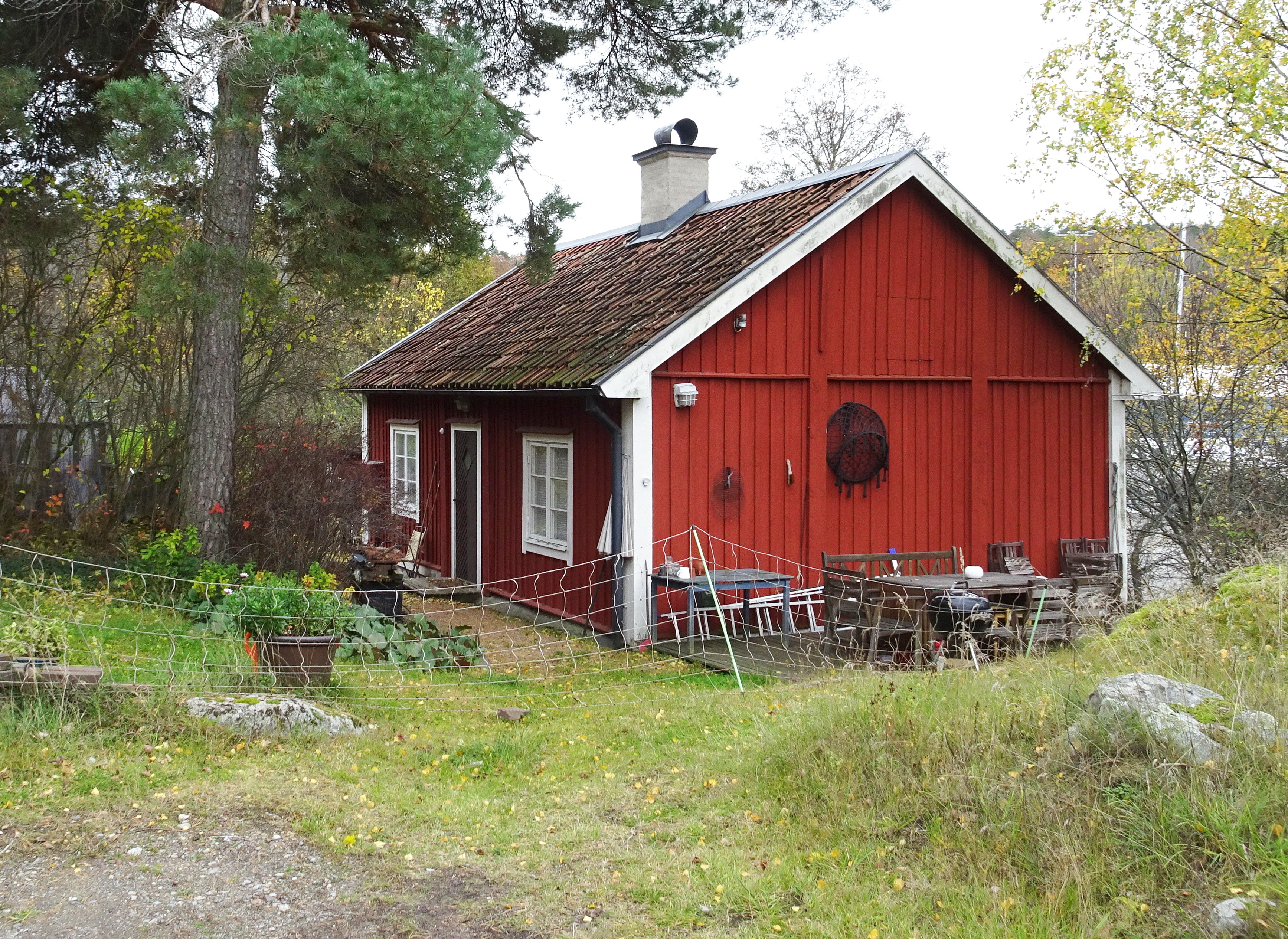 Före detta värdshus och sjökrog "Råstock" i Sätraskogens naturreservat